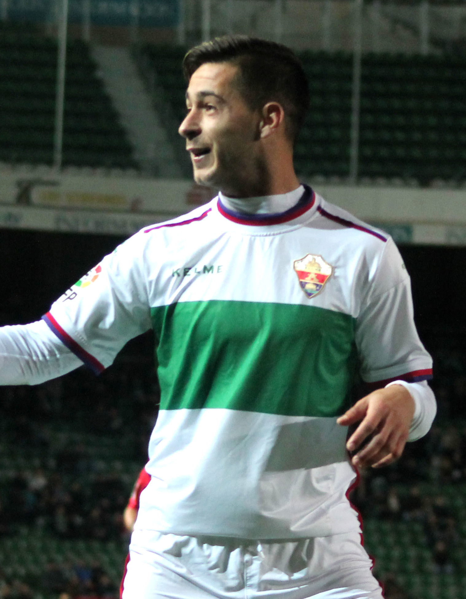 Elche vs Mallorca